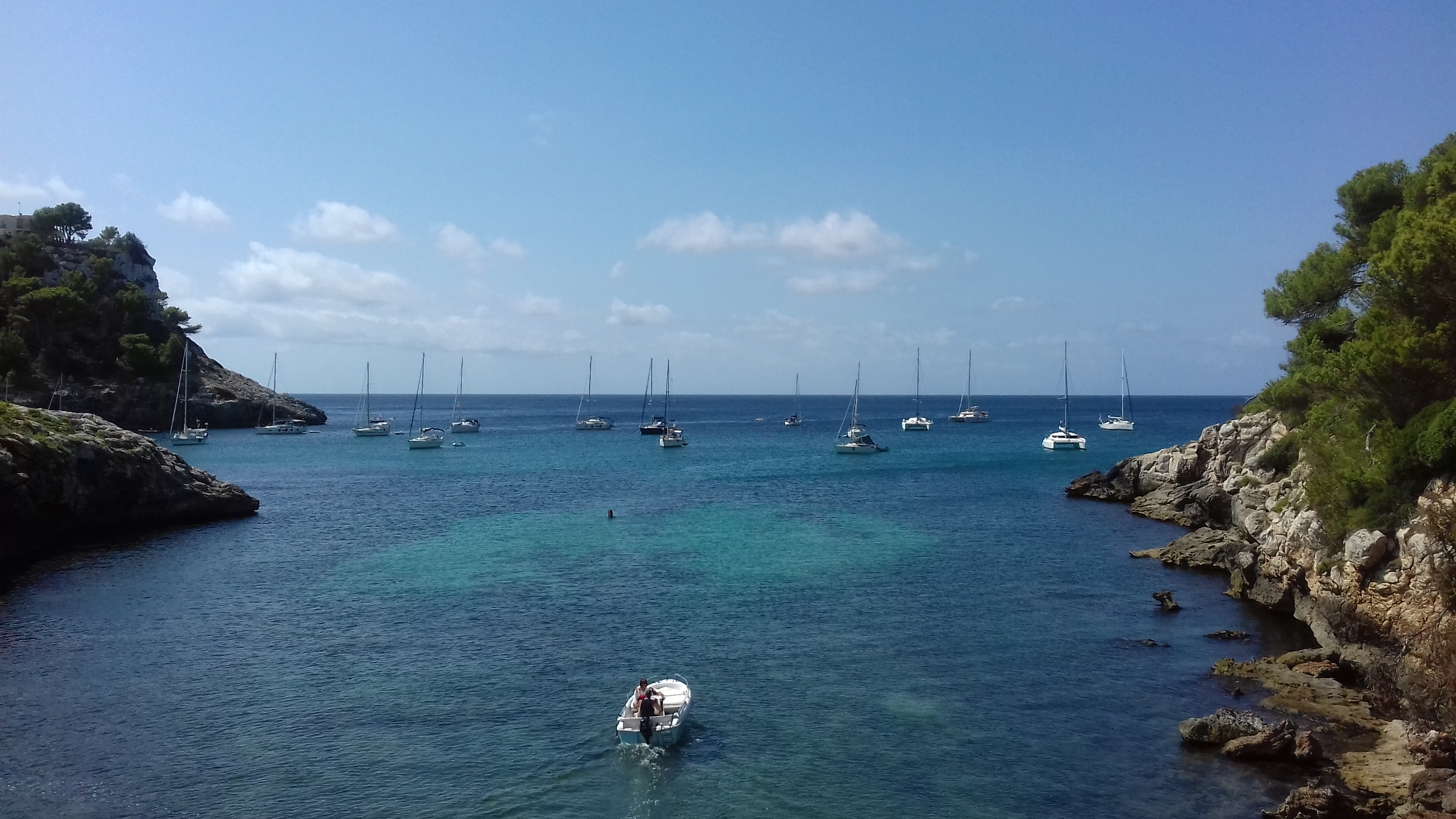 Cala Galdana, Menorca, Espana